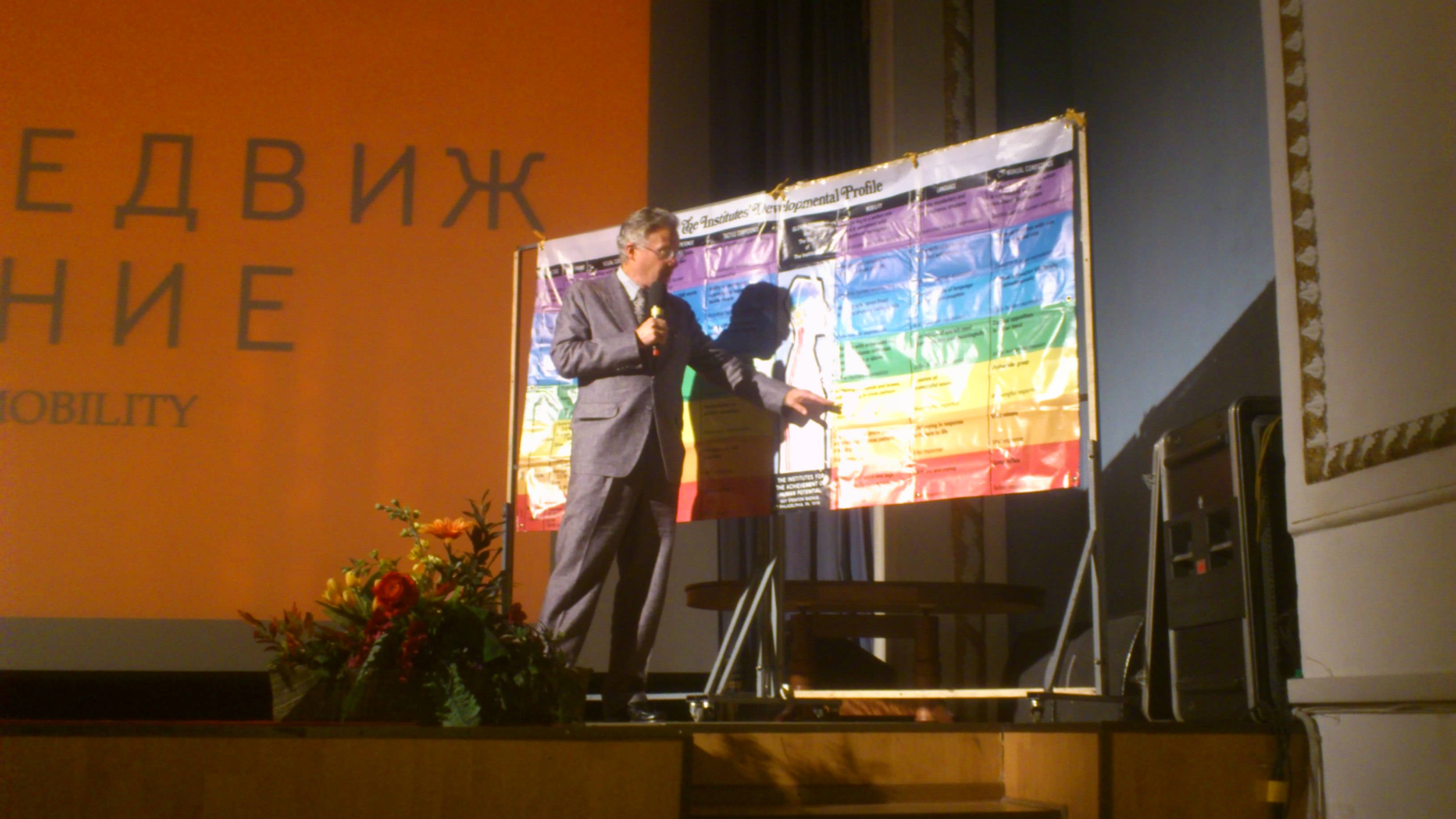 Дуглас Доман на семинаре в Москве (Дворец культуры Российского Государственного Социального Университета, Благотворительный фонд «Остров надежды»), рассказывает про профиль развития ребёнка.